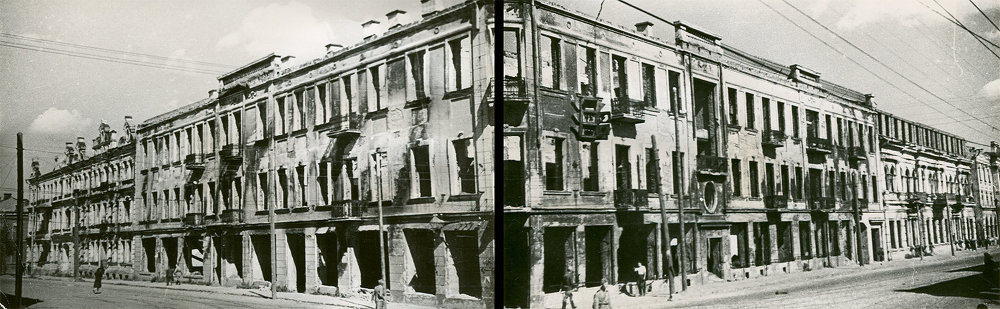 Вызваленне Мінска. Рог вуліц Валадарскага і Савецкай (праспект Незалежнасці). Будынкі злева захаваліся ў перабудаваным відзе (у першым з іх ужо доўгі час знаходзіцца чабурэчная), на месцы будынкаў справа цяпер двор і кінатэатр "Цэнтральны".